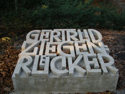 Oryginalny, modernistyczny nagrobek w lapidarium na Cmentarzu Centralnym w Szczecinie. Pochodzi z lat 20. XX wieku. Wykonany został w nieznanym warsztacie kamieniarskim z odlewanego betonu w kształcie prostokątnej leżącej płyty nagrobnej, której całą powierzchnię pokrywa rozplanowany w trzech wersach głęboko reliefowany majuskułowy napis zwierający imię i nazwisko żony kapitana Gertrudy Ziegenrűcker.